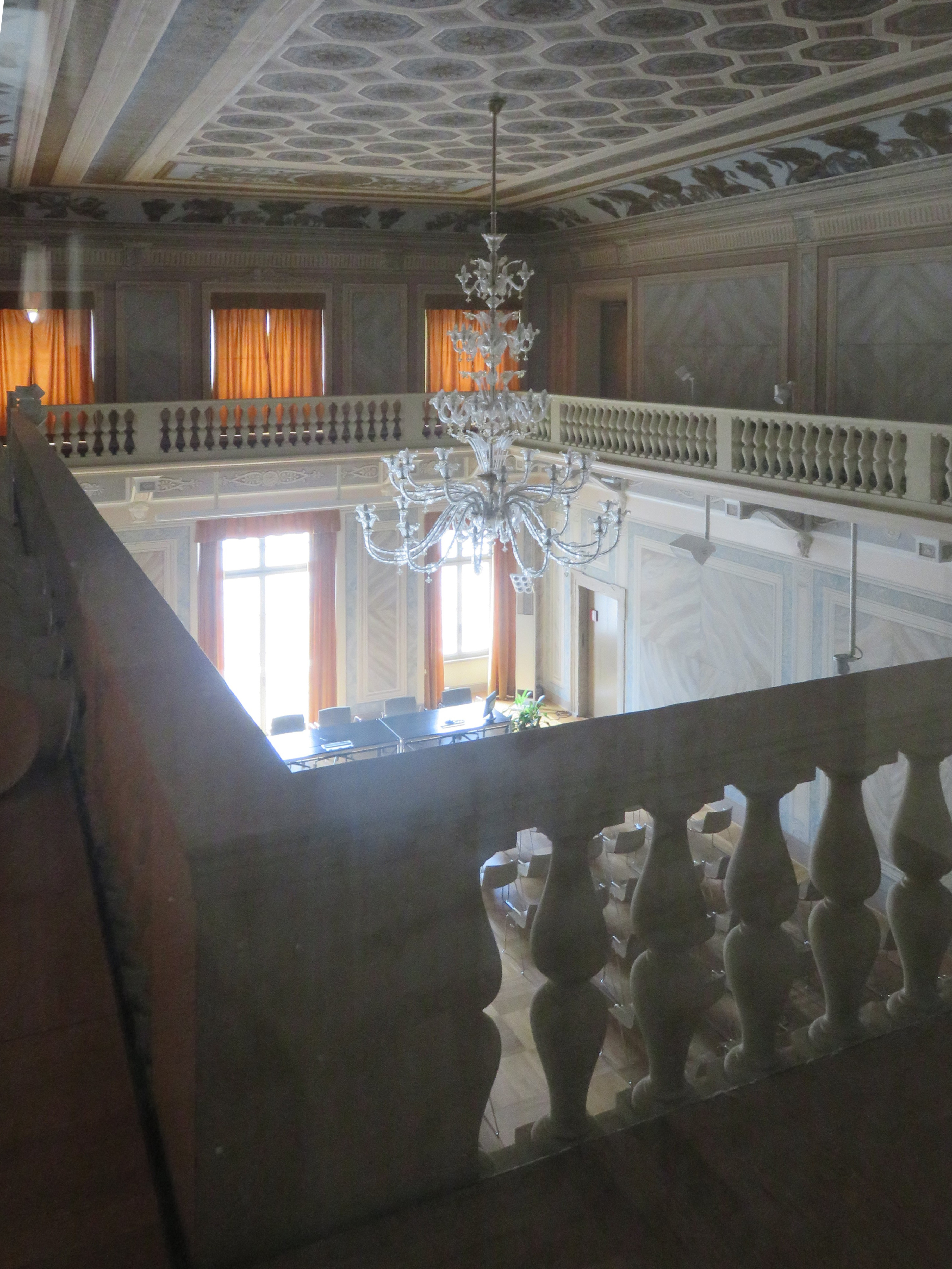 Aula magna al primo piano. Vista dal ballatoio al secondo piano